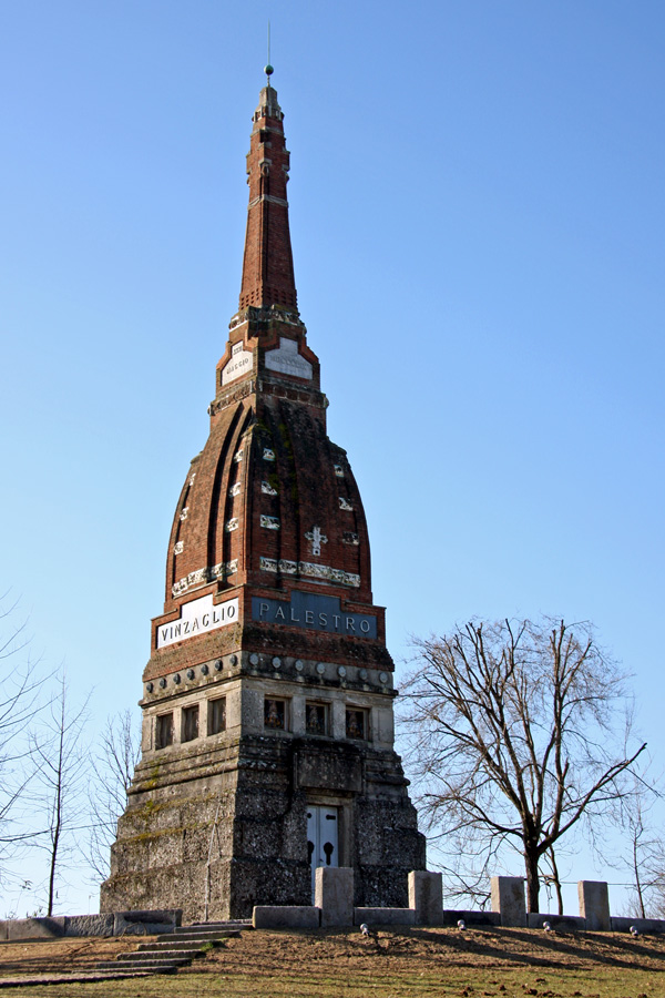 Il monumento-ossario di Palestro (PV), memoriale della battaglia ivi combattuta il 30 e 31 maggio 1859, architetto: Giuseppe Sommaruga